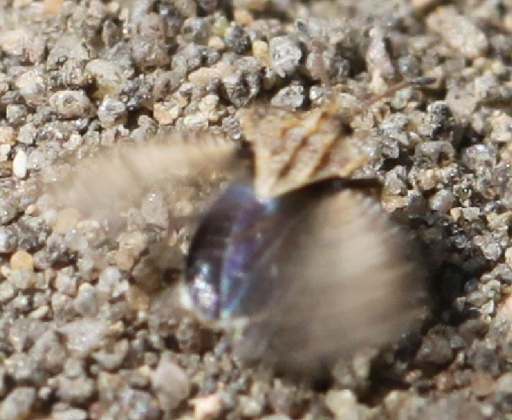 Netzwanze Tingis reticulata mit gespreizten Flügeln, am 19. Juni 2018 in der Schwetzinger Hardt